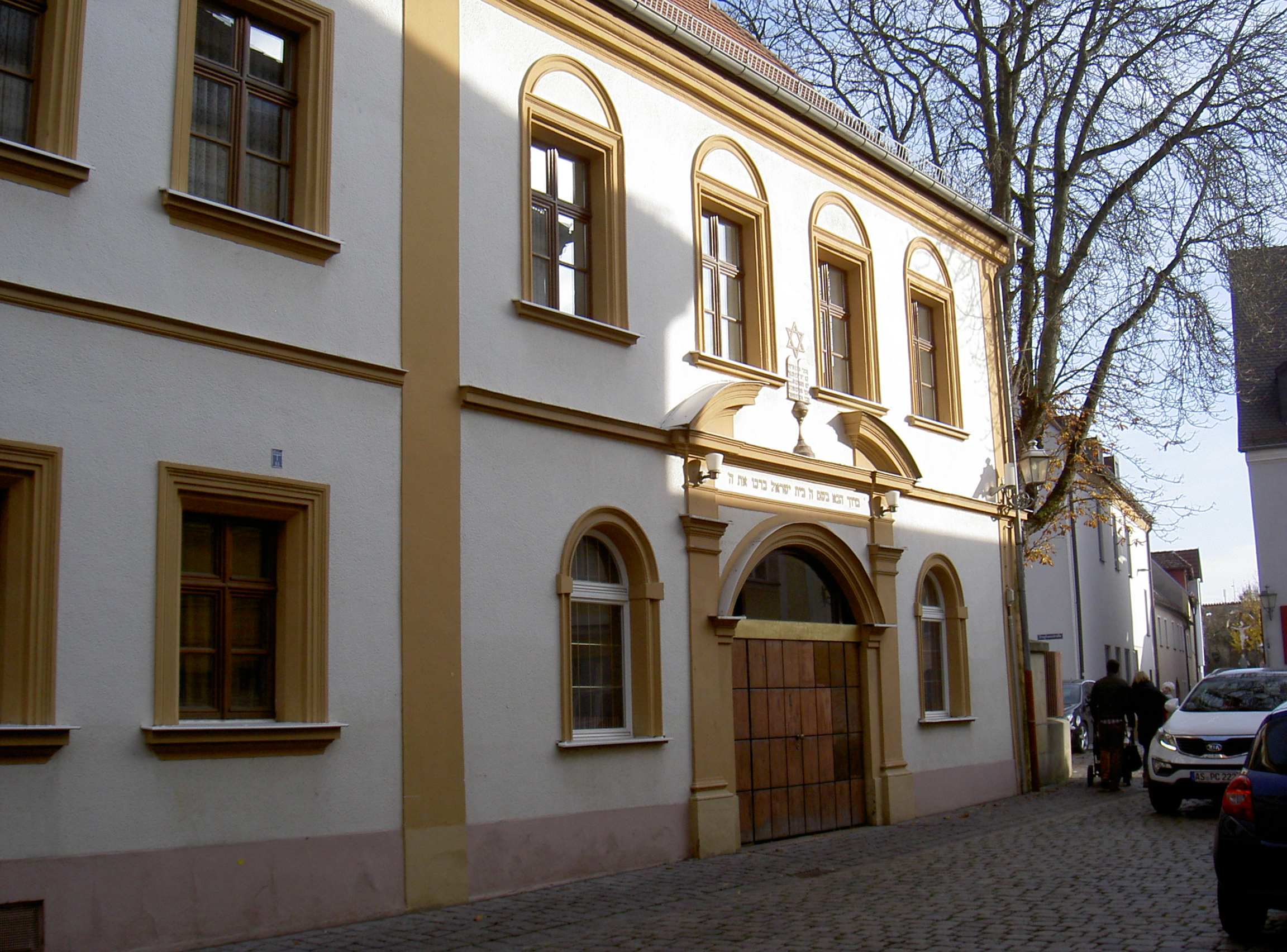 Synagoge in Amberg Salzgasse 5